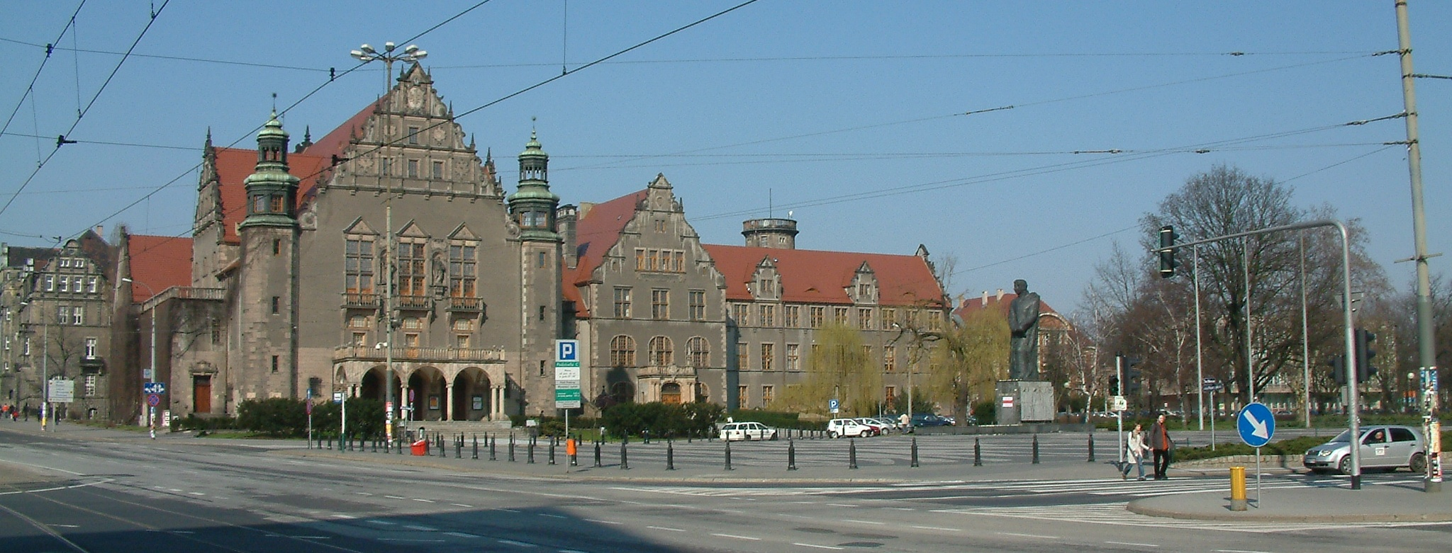 Plac Adama Mickiewicza w Poznaniu (Adam Mickiewicz Sq. in Poznań)